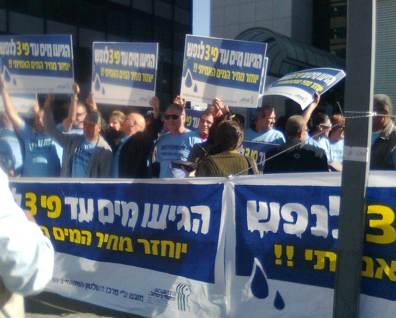 הפגנה מול משרדי רשות המים